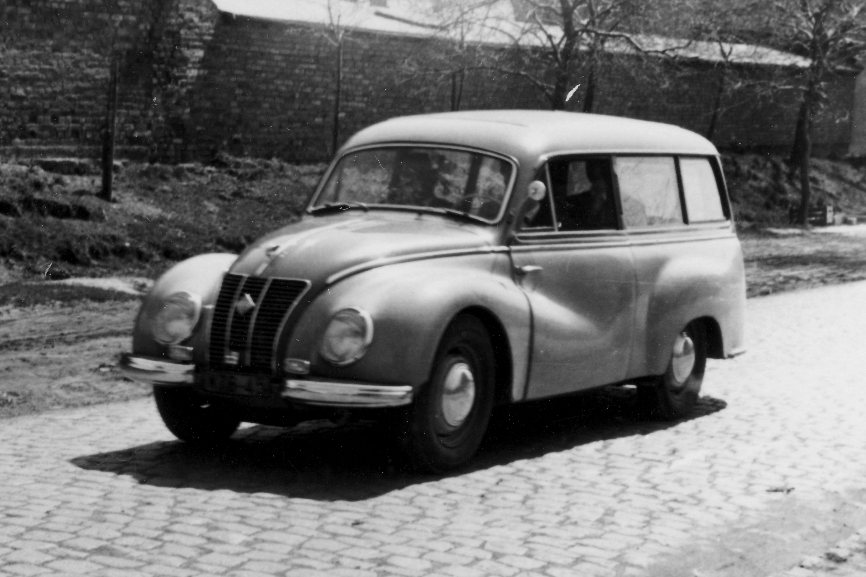 IFA F9 Kombi, Metallaufbau